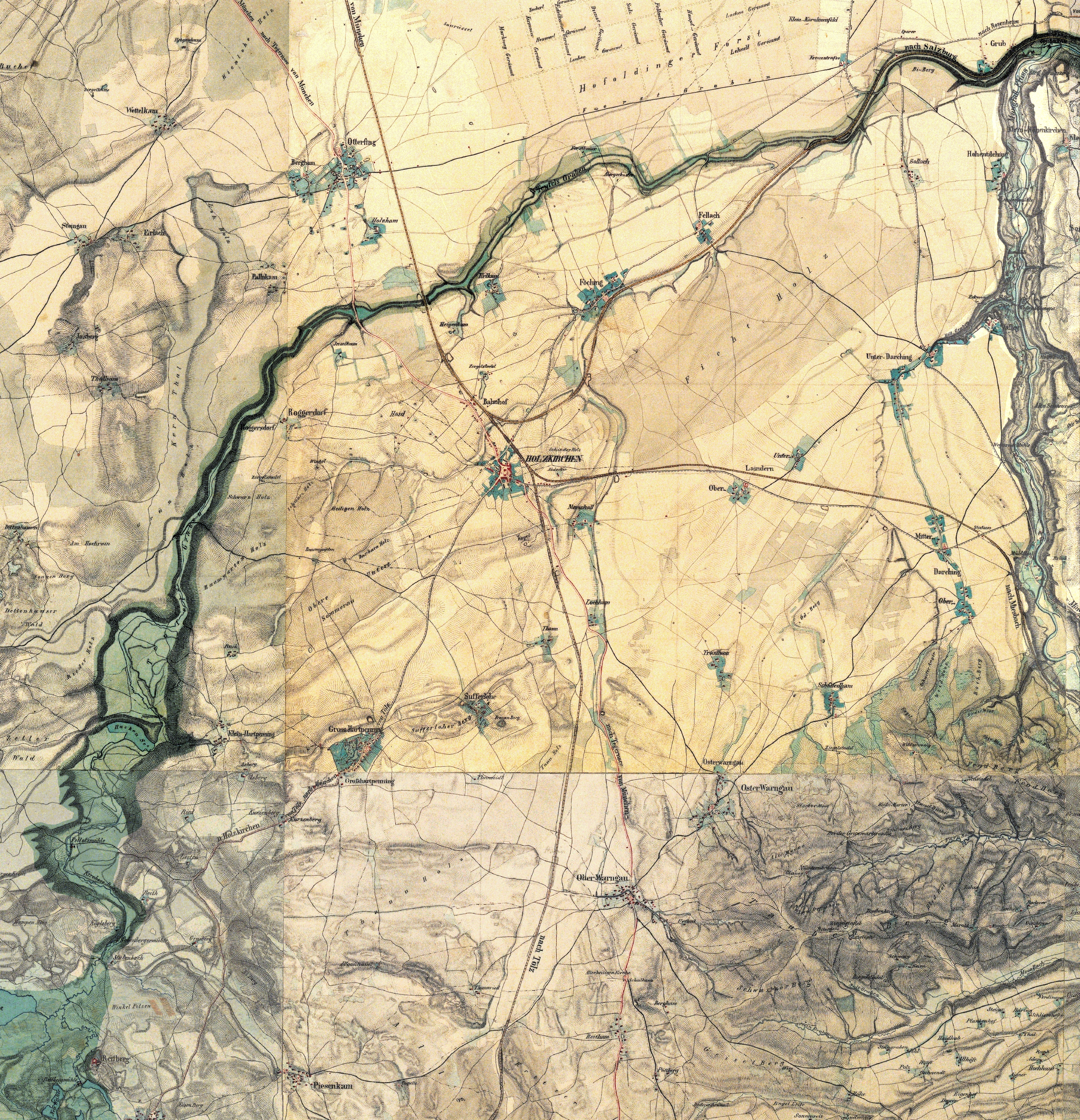 Verlauf des Teufelsgrabens auf Basis einer historischen Karte von 1875-1877, Bearbeitung eigene Arbeit